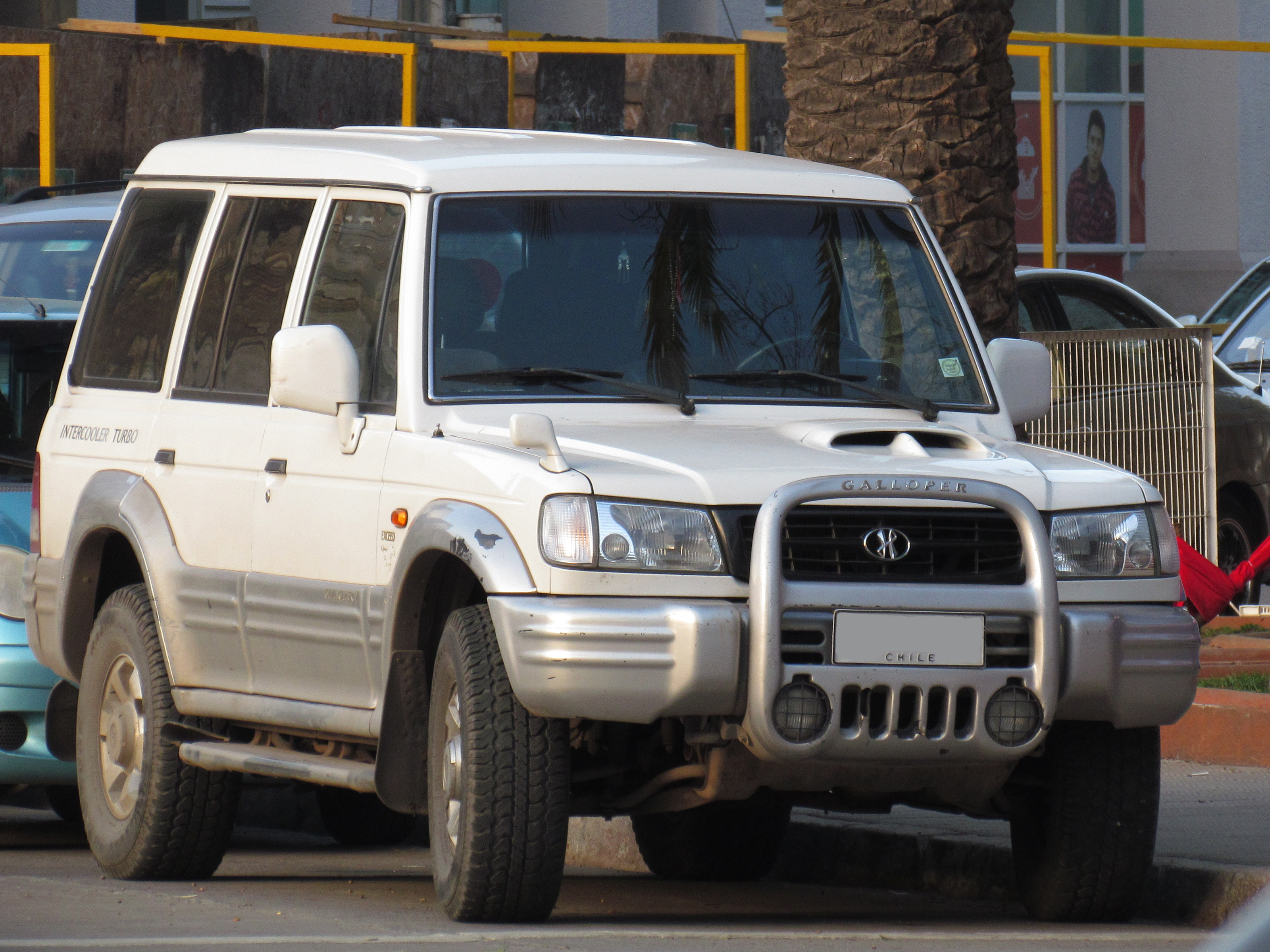 Hyundai Galloper II Exceed 2.5d Turbo 2001